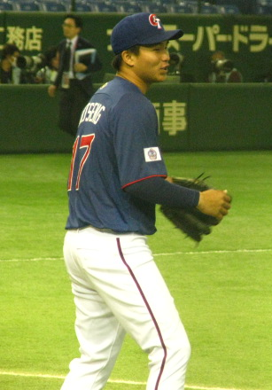 2013 WBC